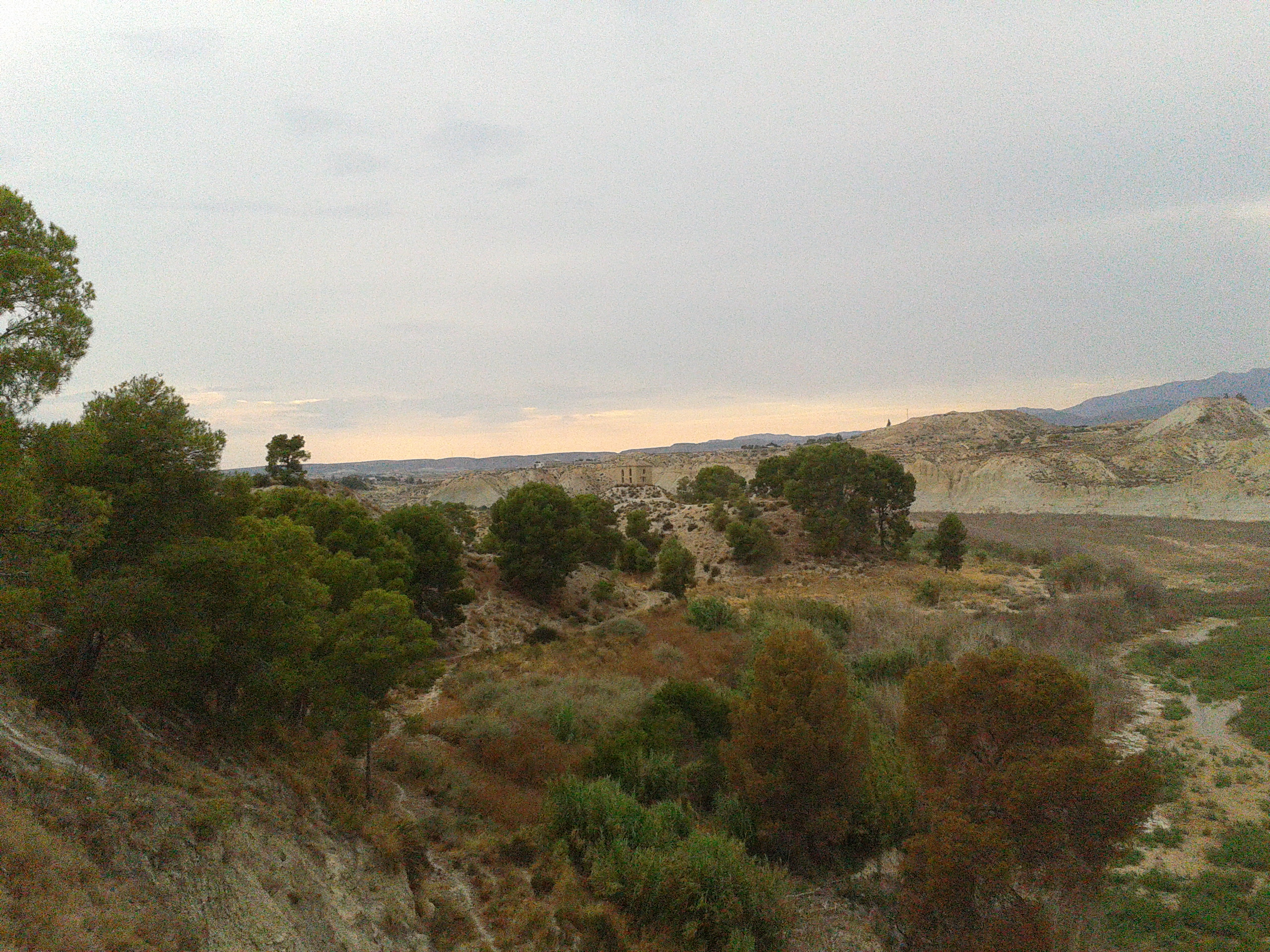 Paraje natural del Rodeo de la Ermita y su palomar.